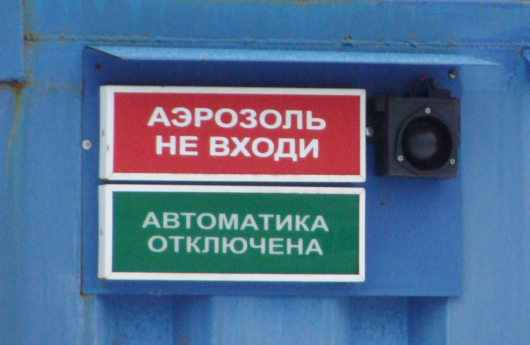 Оповещатели системы аэрозольного пожаротушения дизель-генератора